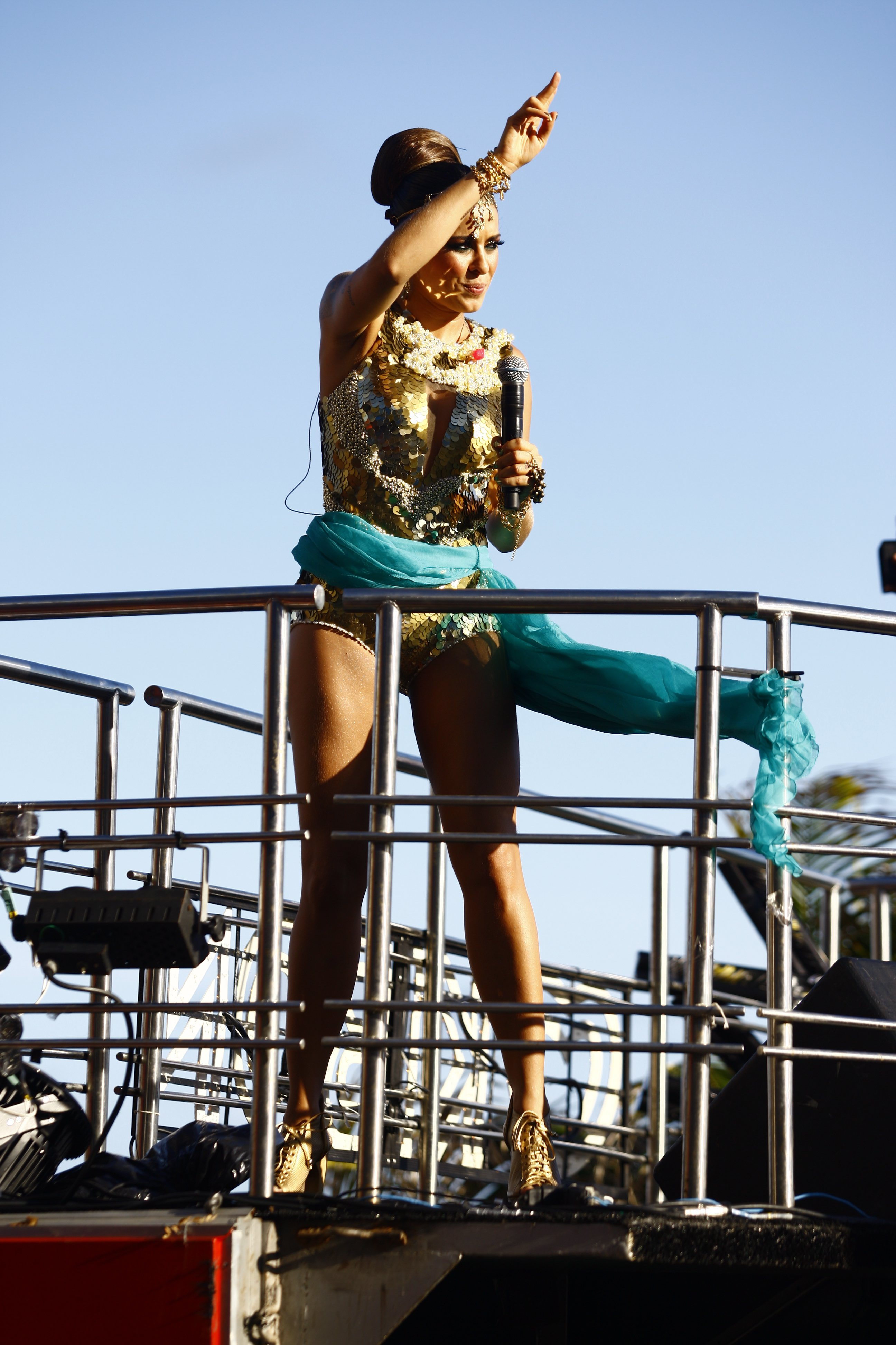 Banda Cheiro de Amor no Circuito Dodô em (21.02). Foto: Fernando Vivas / Ag. A Tarde